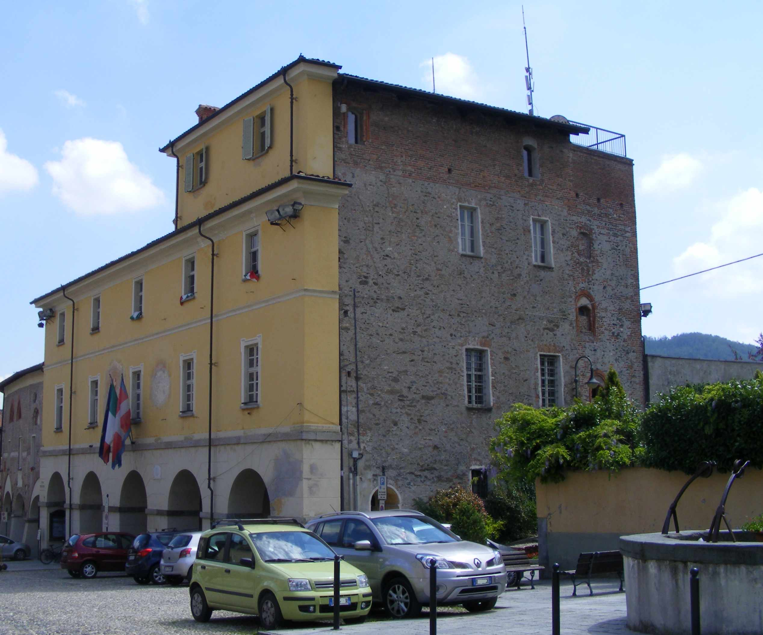 Avigliana (TO): il municipioUnknown